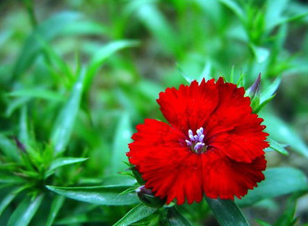 无名的小红花 本图像由上传人zh:User:Xchunyu的友人黄晓波提供，经原著作人授权使用。